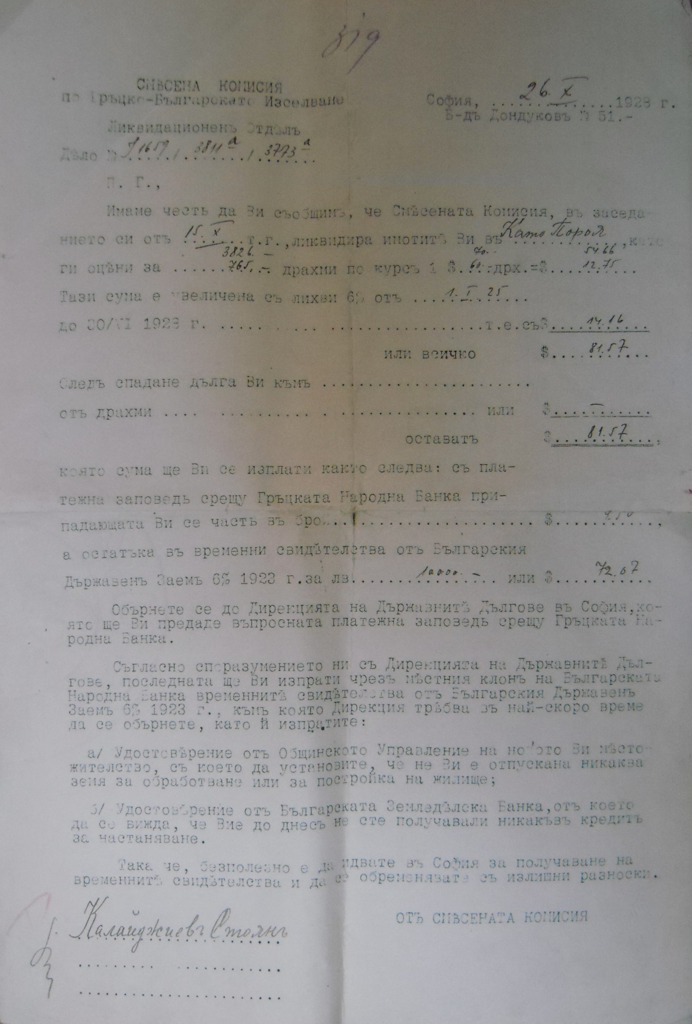 Документ за ликвидиране на имоти на български бежанец от Долни Порой.